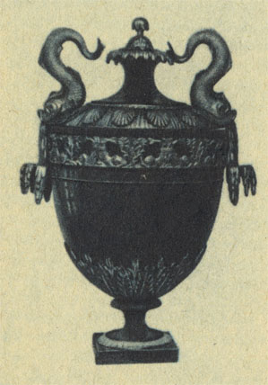 Ваза из темно-вишневого коргонского порфира. Колыванская фабрика, 1802 г.